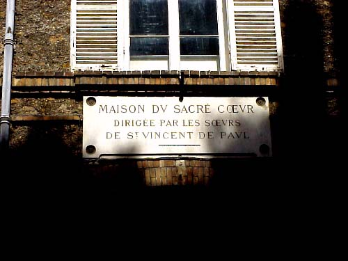 Enseigne de l'école du Sacré-Coeur, rue Jean Cottin, Paris XVIII-ième arrondissement.